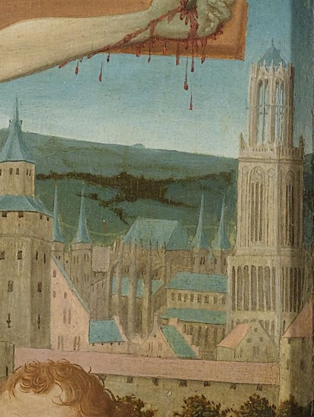 Fragment uit een drieluik met de kruisiging van het middenpaneel met Christus aan het kruis met op de achtergrond een profiel van de stad Utrecht.; Utrecht, ca. 1460, olieverf op paneel